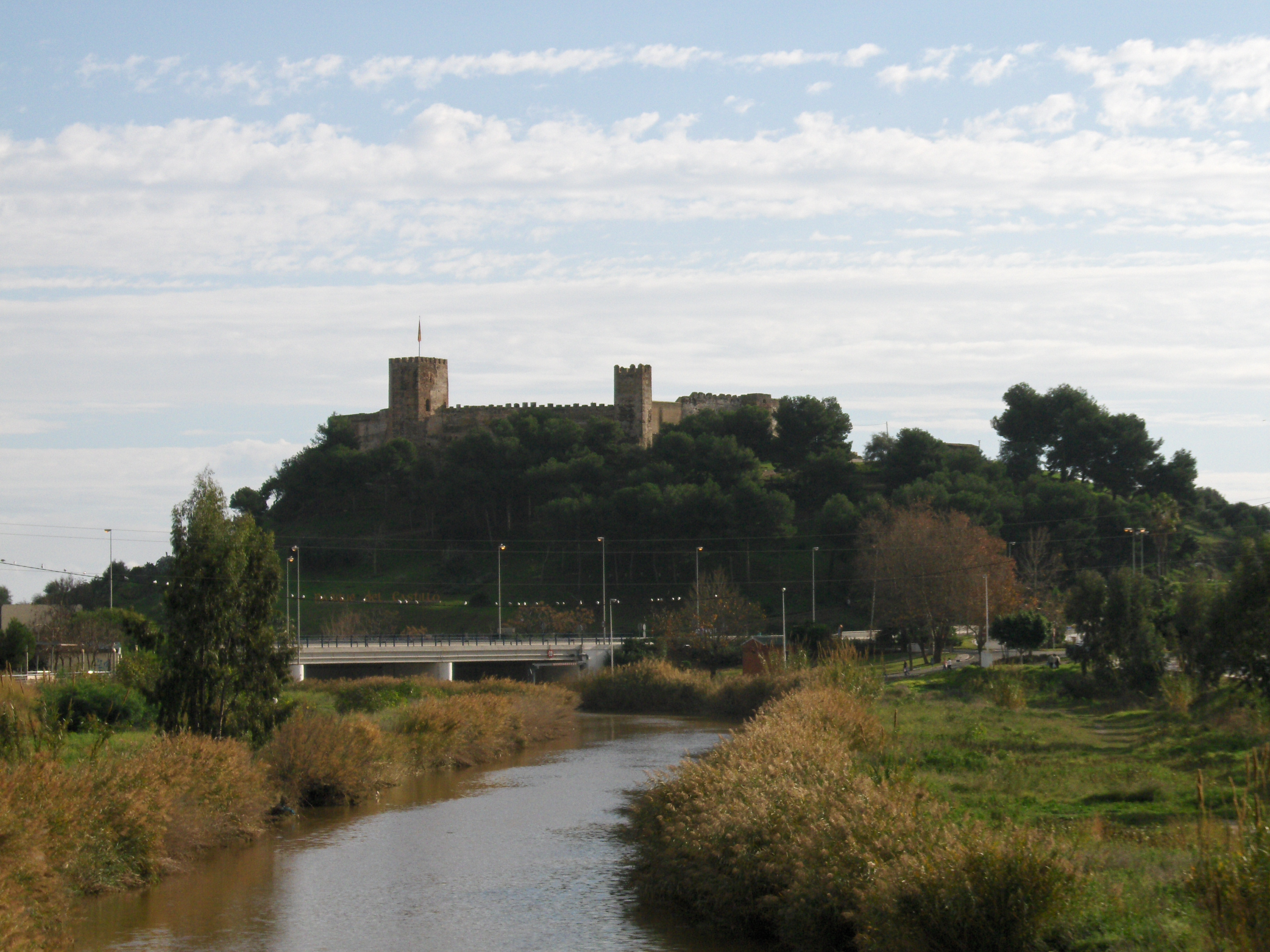 Castillo de Sohail (Fuengirola, España)/ Castle of Fuengirola, Spain.